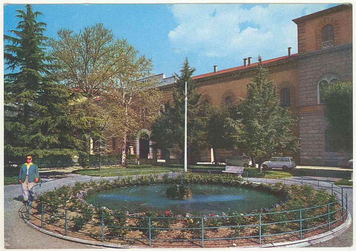 PG Foligno - facciata esterna e ingresso della Caserma Gongaza del Vodice Ferrante - S.A.U.S.A. - Scuola Allievi Ufficiali e Sottufficiali di Artiglieria Pesante Campale - dal 1996 ospita il Centro di Selezione e Reclutamento Nazionale dell'Esercito.